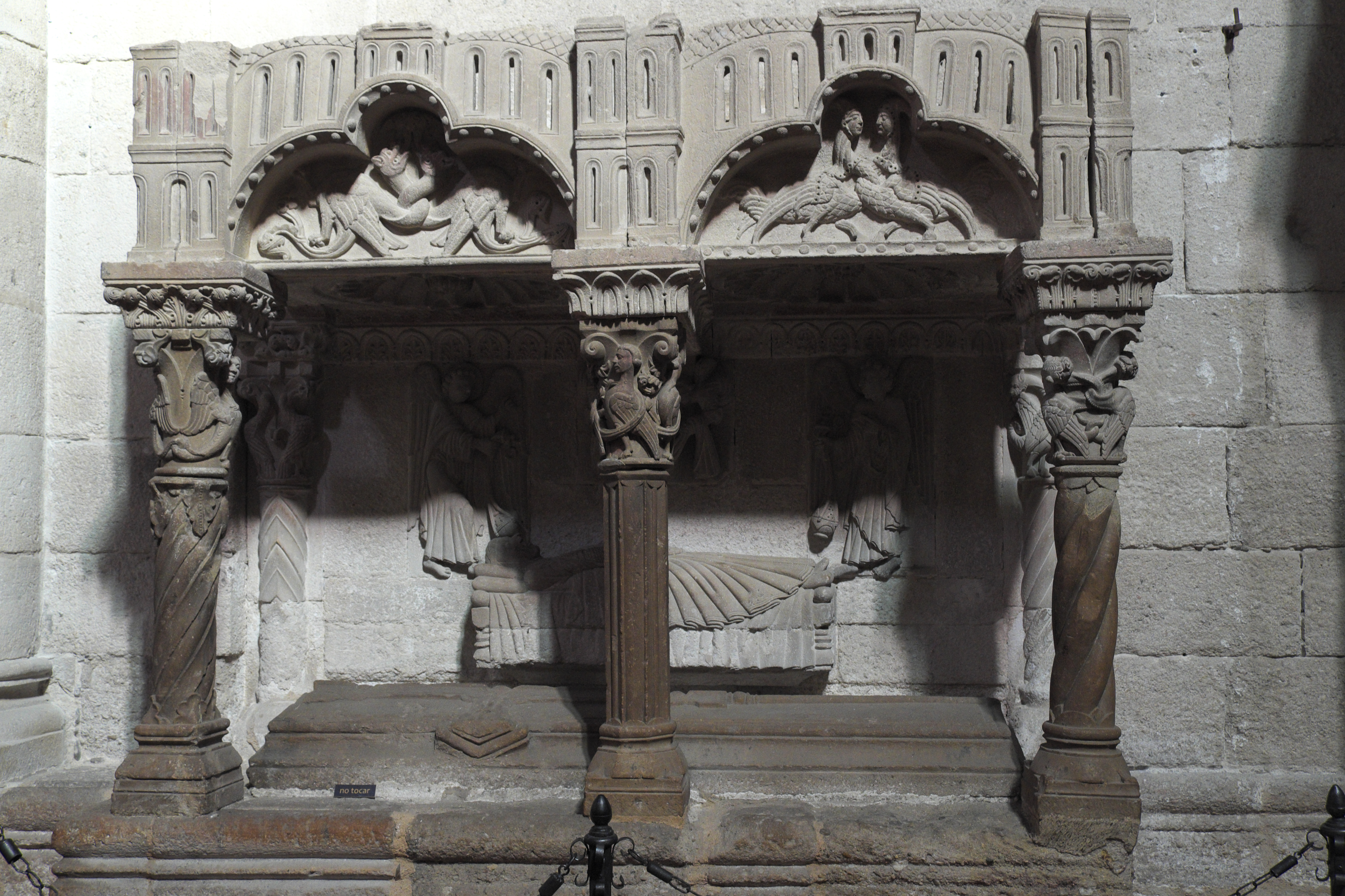 Romanisches Grabmal in der Kirche Santa María Magdalena in Zamora (Kastilien-León/Spanien)